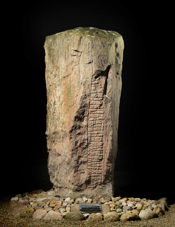 Foto: Nationalmuseet ved Roberto Fortuna